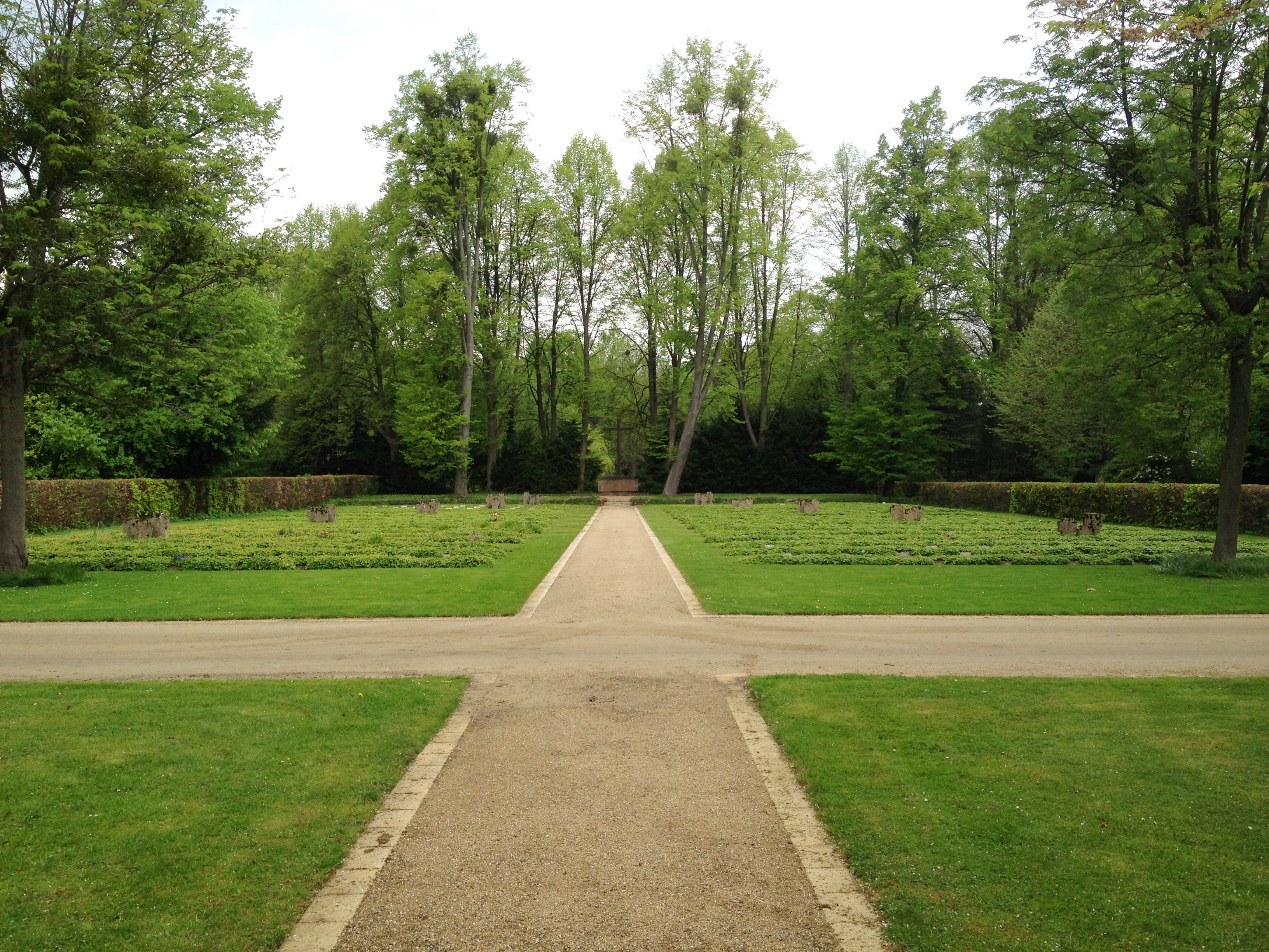 Goslar, Alter Friedhof, Kriegsgräberfeld